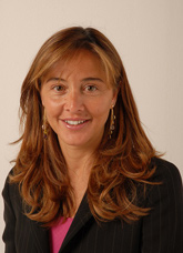 Erminia Mazzoni, politica italiana